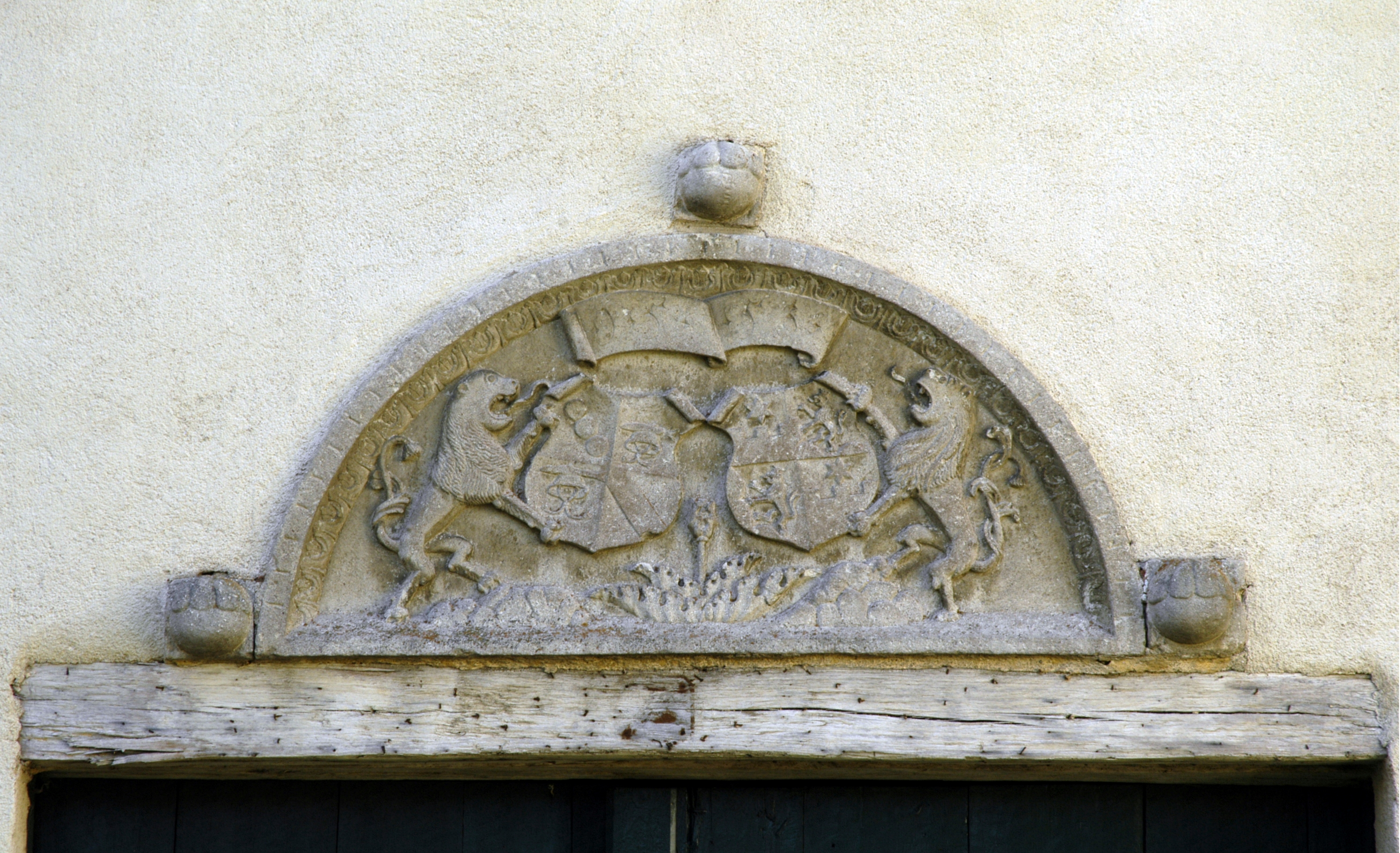 Schrattenthal - Schloss, Wappenaufsatz über dem Portal des Presshauses Dieses Bild wurde anlässlich des österreichischen Tags des Denkmals 2012 in Niederösterreich eingereicht.